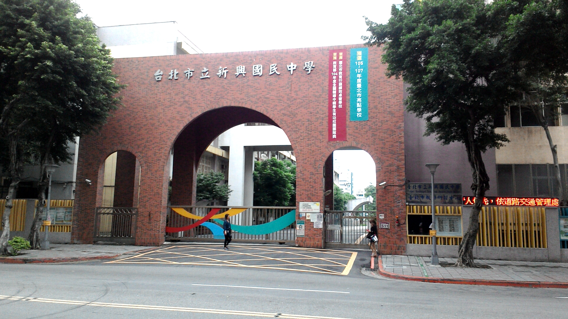 臺北市立新興國民中學，臺北市中山區圓山次分區聚葉里